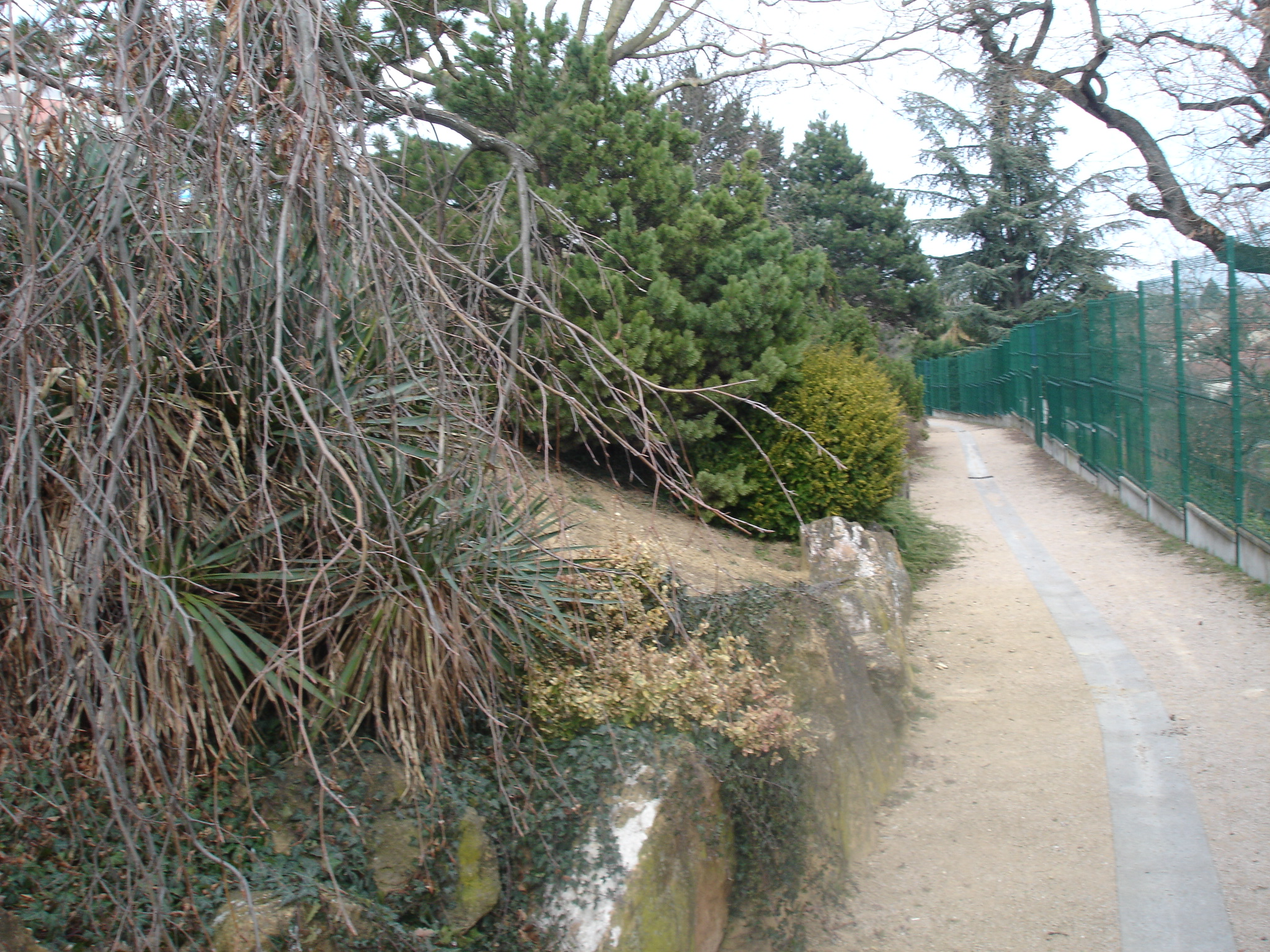 Corbas (69) : l'entrée du parc